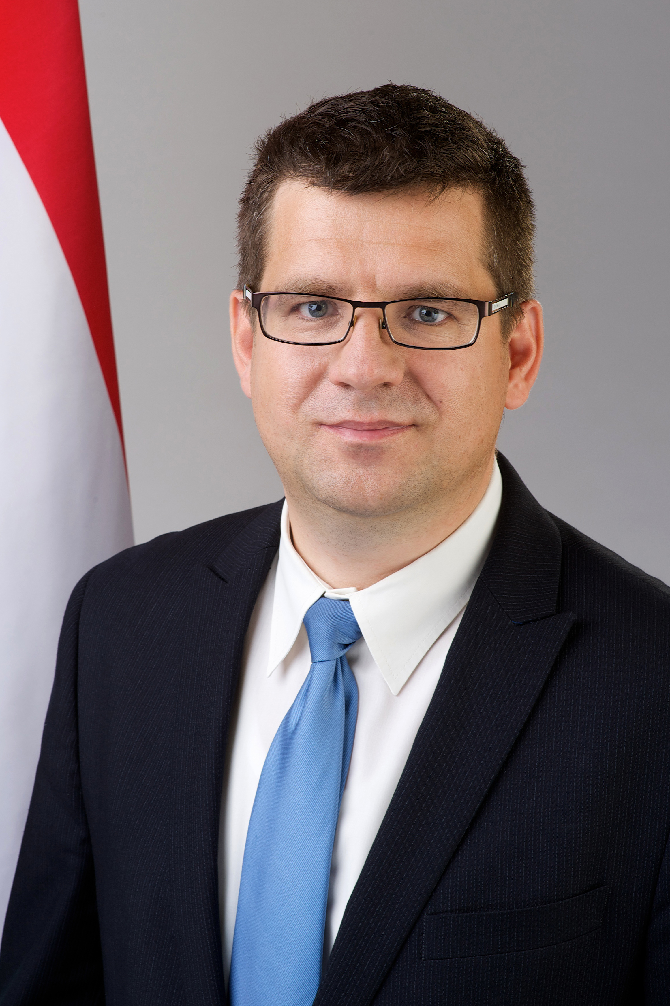 Seszták Miklós nemzeti fejlesztési miniszter